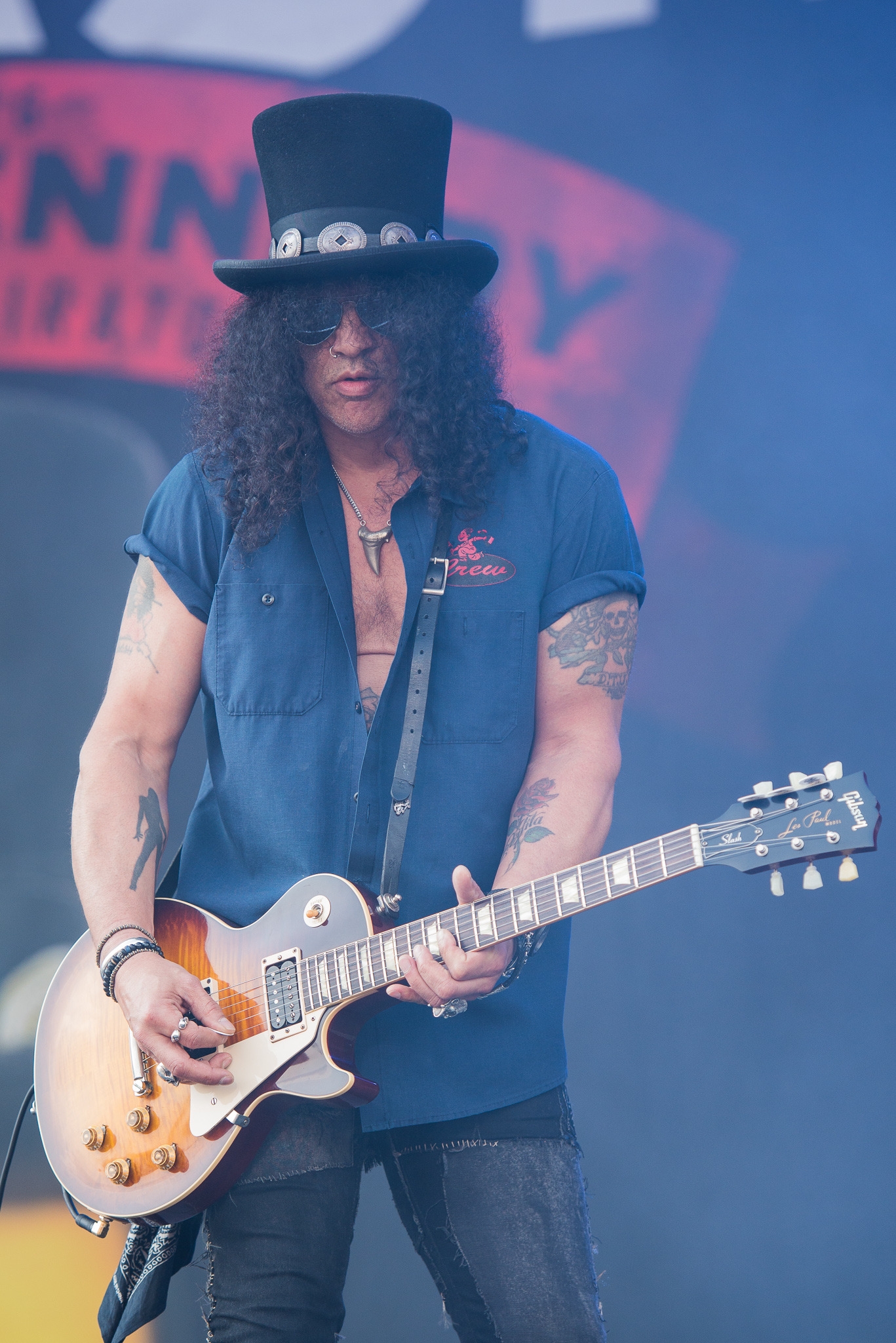 ARGO-Konzerte,Festival,Konzert,Livekonzert,Livemusik,Musik,RiP,Rock im Park 2015,Saul Hudson,Seat Zeppelin Stage,Slash feat. Myles Kennedy & The Conspirators